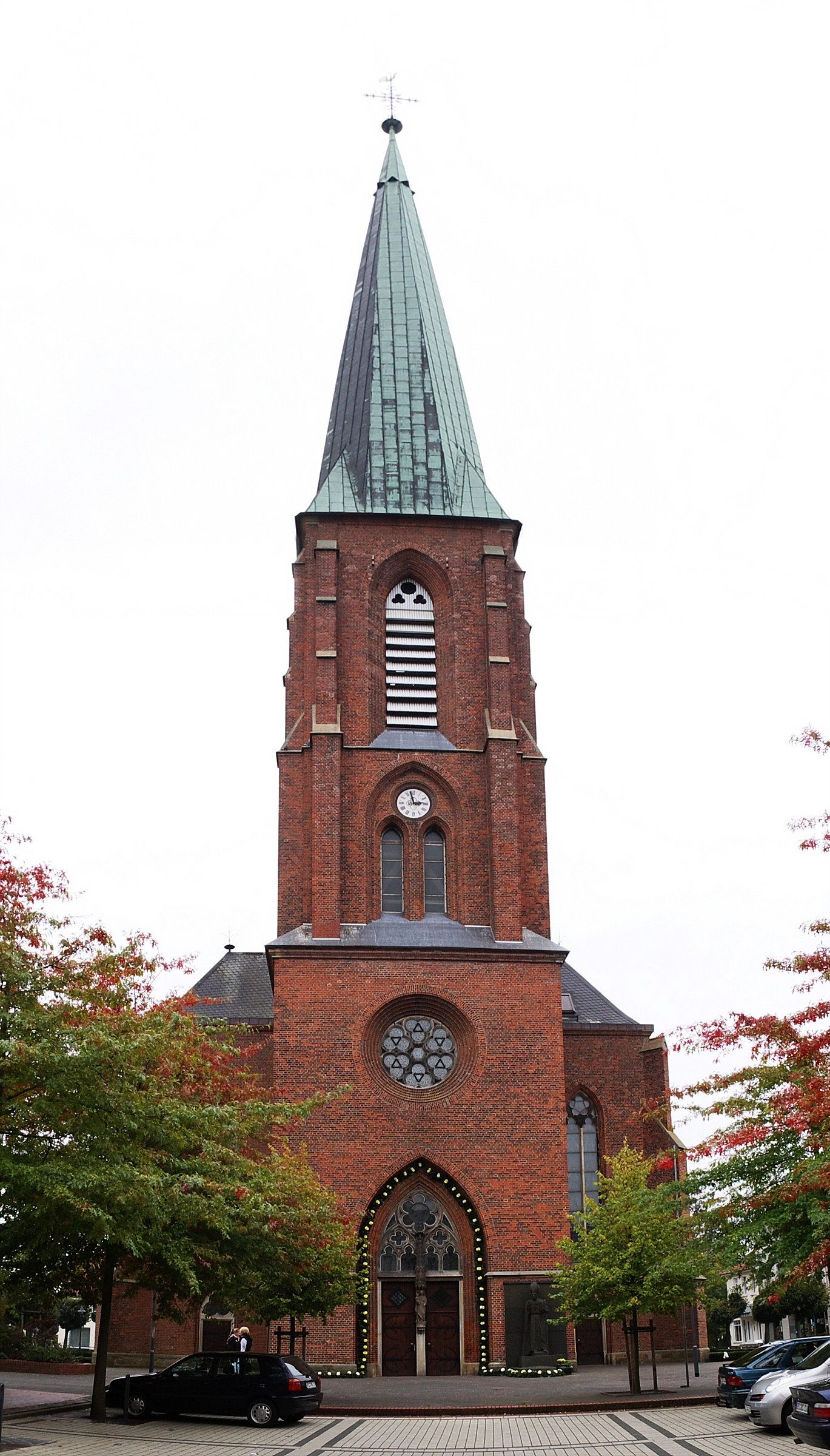 Turm der Kirche St. Catharina in Dinklage, Niedersachsen